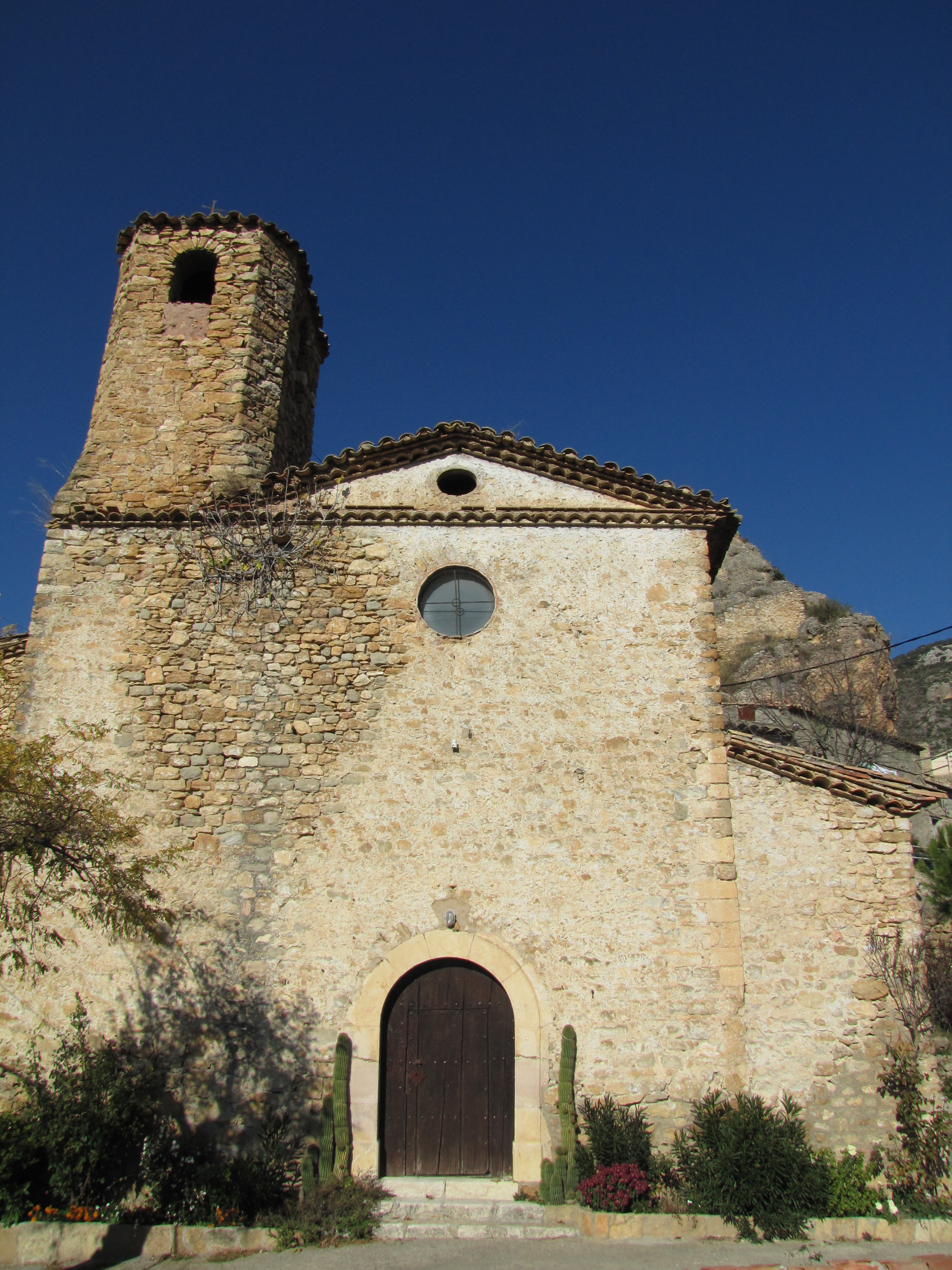 Corça, Ager. Iglesia